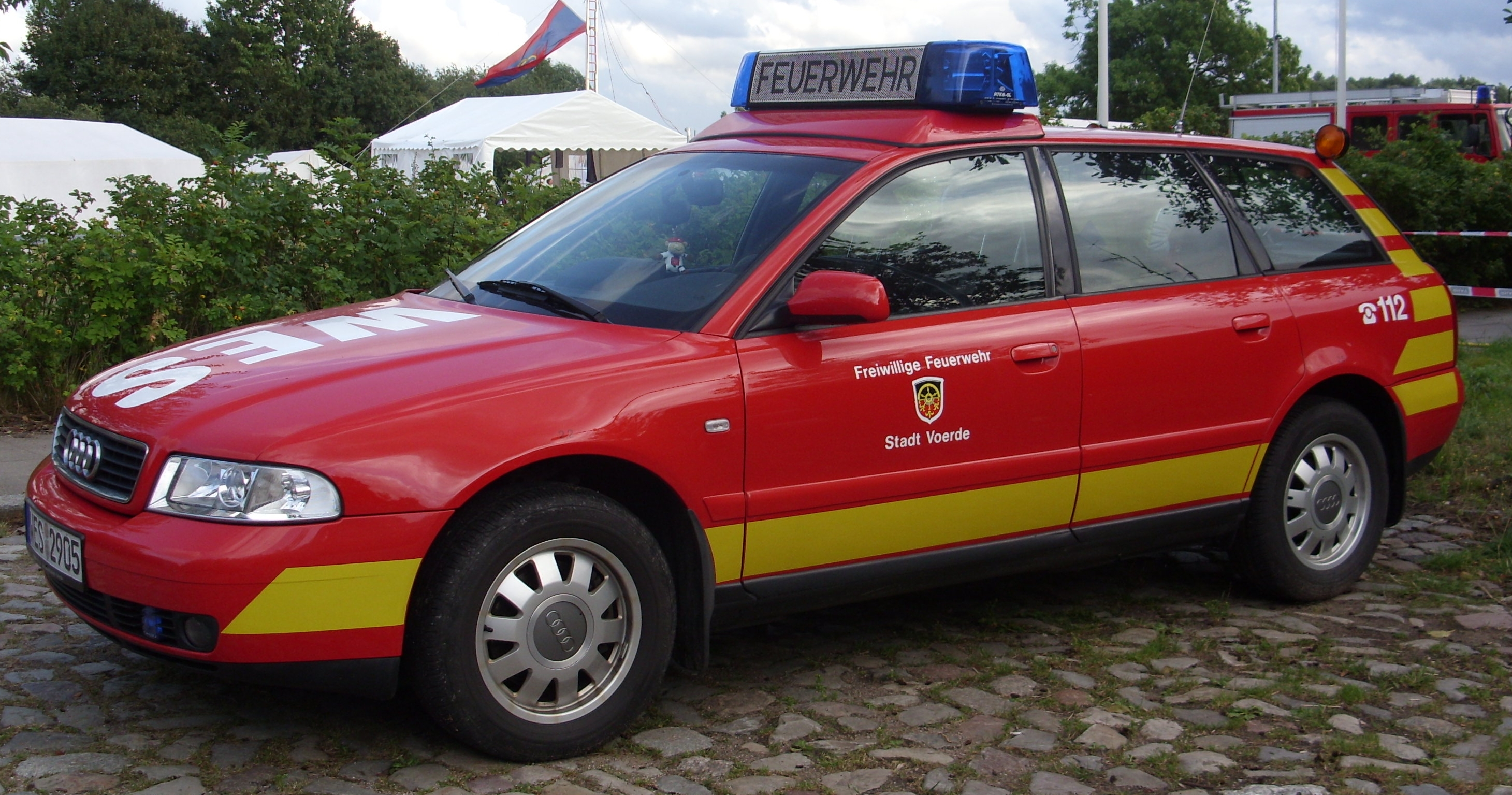 Der Kommandowagen (kurz KdoW) der Voerder Feuerwehr